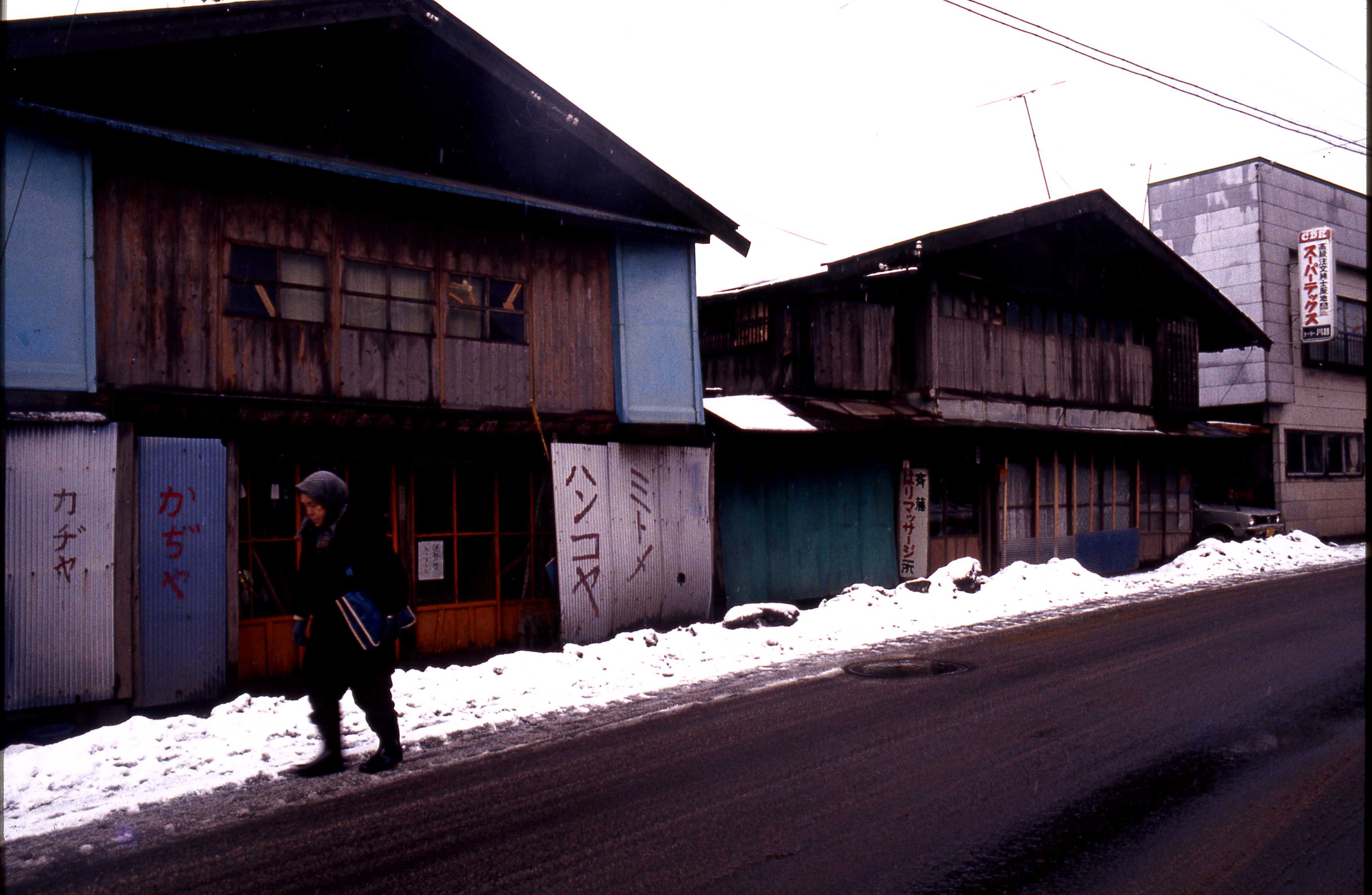 1980年当時の鰺ヶ沢の町